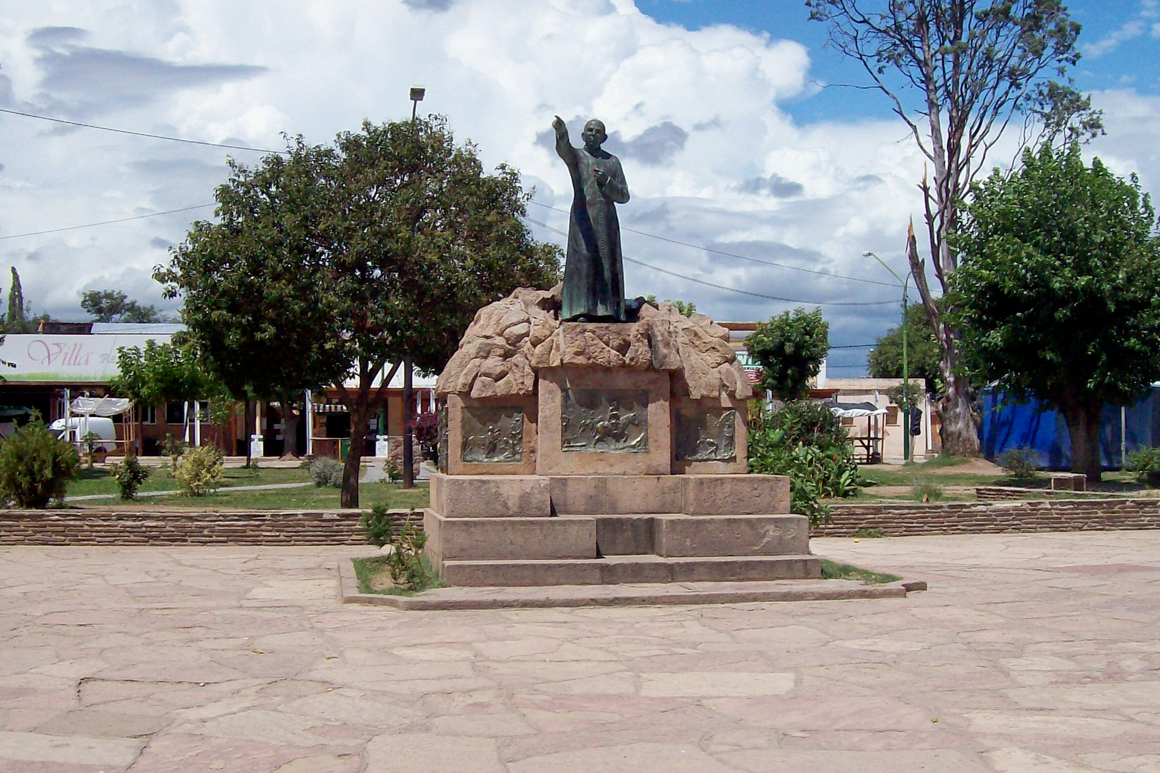 Monumento al Cura Brochero en la Plaza Centenario de Villa Cura Brochero